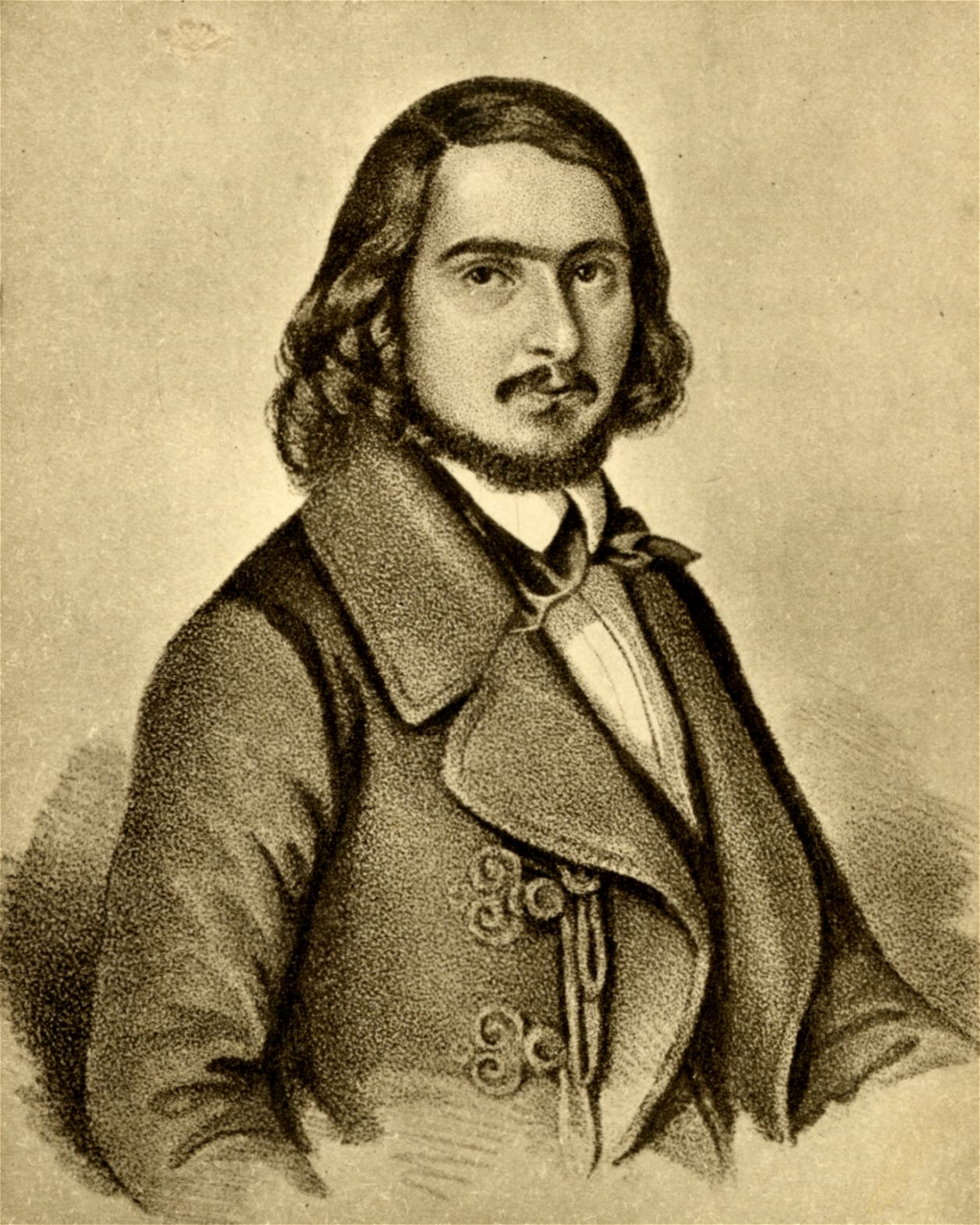 Georg Herwegh (1817-1875), poeta tedesco